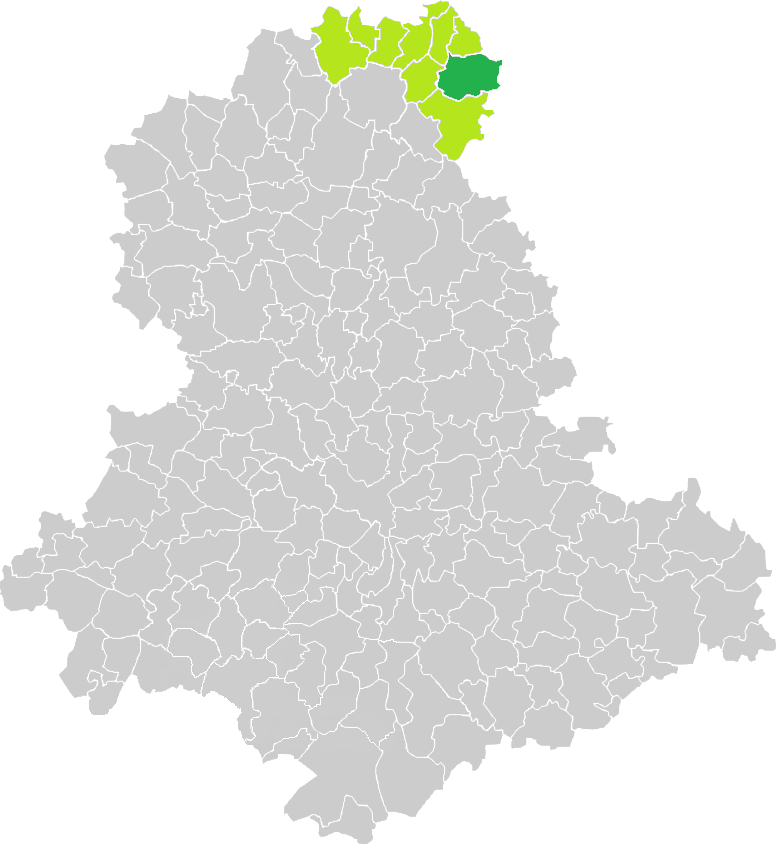 Carte de situation de la commune de Saint-Sulpice-les-Feuilles (en vert foncé) dans le votre Canton (en vert clair) sur une carte des communes de la Haute-Vienne